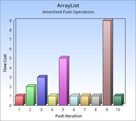 df